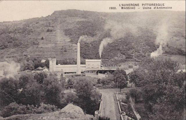 Usine d'antimoine du Babory de Blesle - 1900 - Auvergne - France